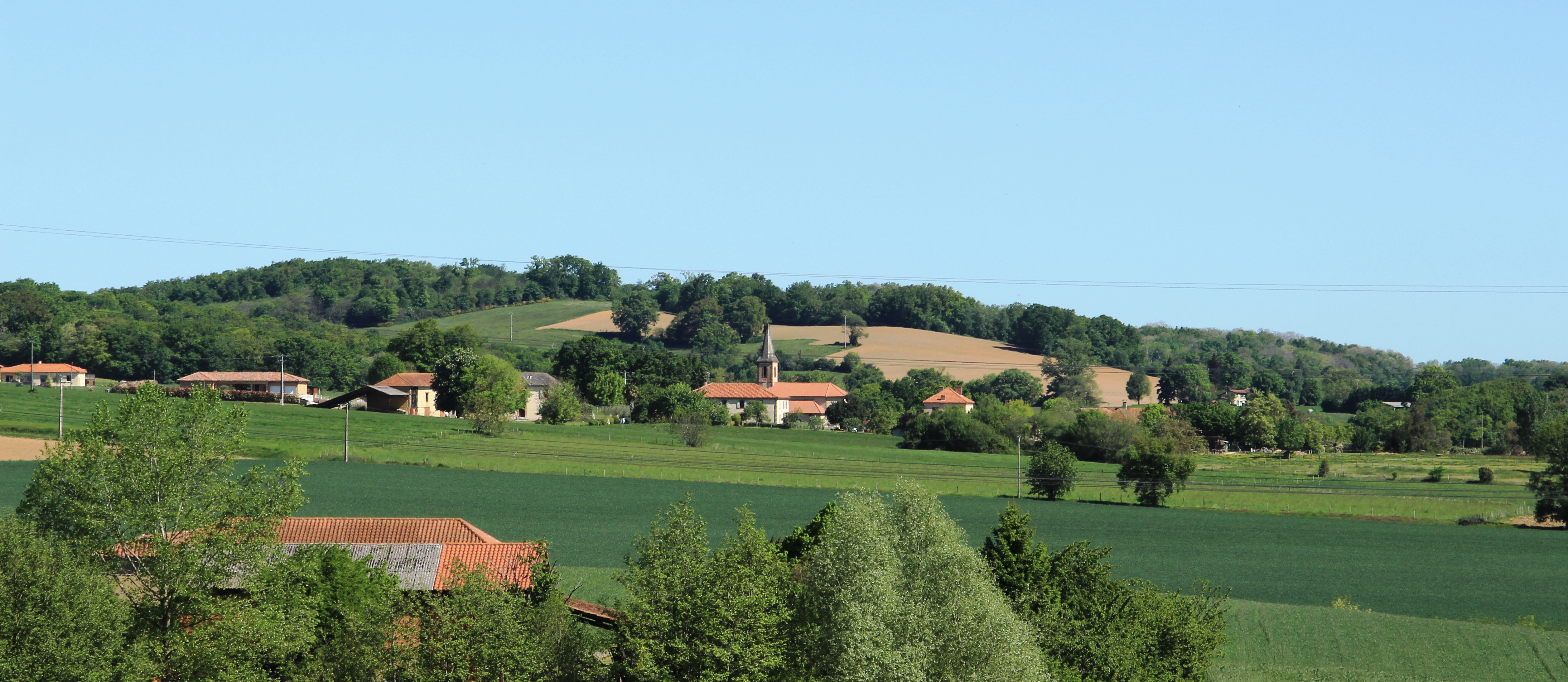 Lapeyre (Hautes-Pyrénées)